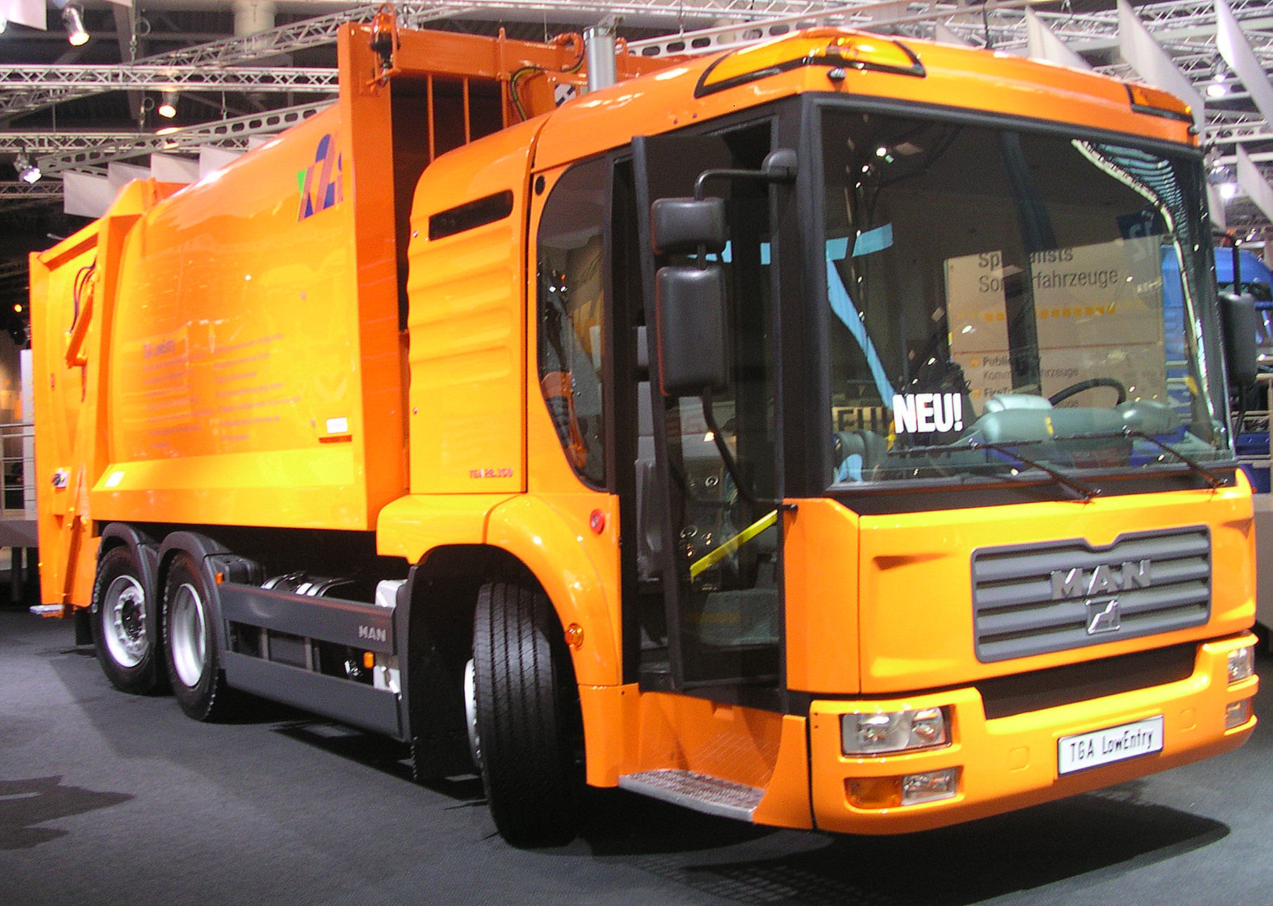 Nutzfahrzeug-IAA 2004 in Hannover. MAN TGA 28.350 Müllwagen mit speziell für leichten Ein- und Ausstieg konzipiertem Fahrerhaus